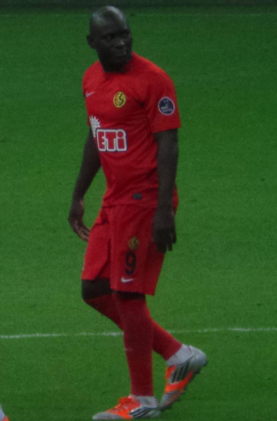 Bienvenu with Eskişehirspor